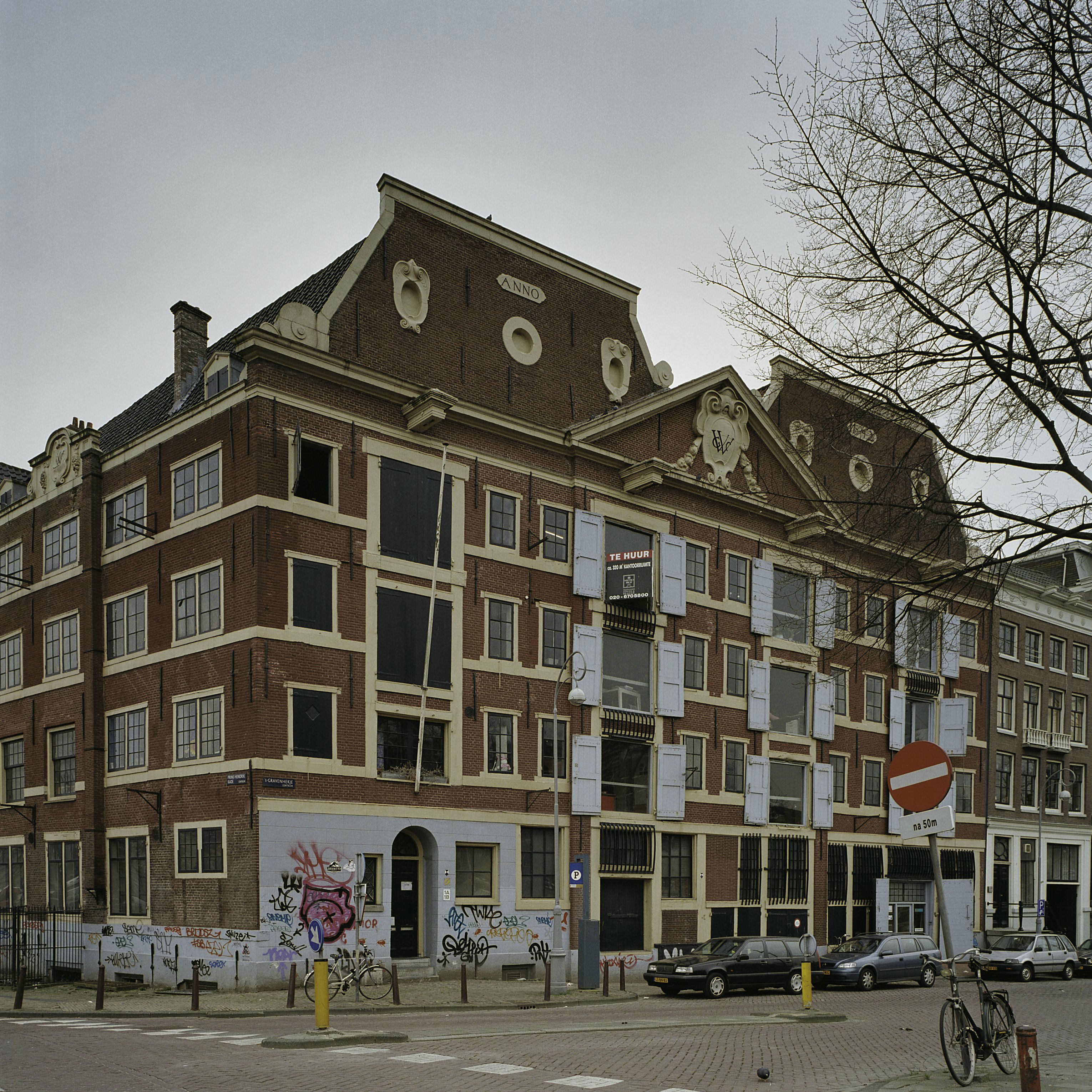 W.I.C. pakhuiscomplex: Pakhuis met trapeziumvormige voorgevel, en een fronton met het wapen van de Westindische Compagnie (opmerking: Gefotografeerd voor Monumenten In Nederland Noord-Holland)